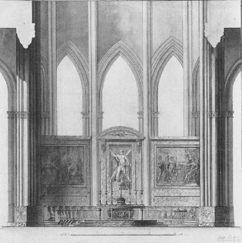 Titre: Elévation du choeur d'une église Média: Pen and Ink and Wash w/wc over pierre noire Taille: 18,9 x 18,9 in. / 48 x 48 cm. Vente: Paris, Hôtel Drouot, Oger & Dumont, Friday, November 17, 2000 [Lot 29]